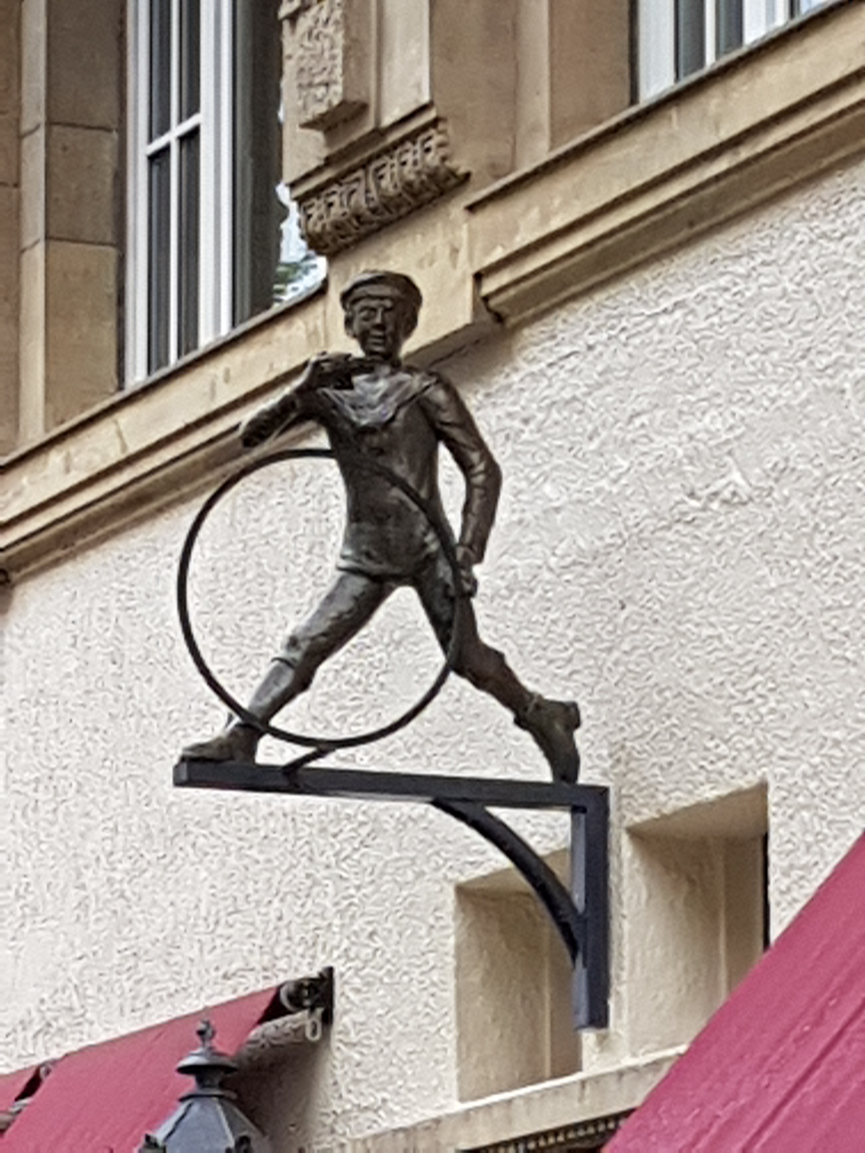 Skulptur "Der Jung mit dem Tüdelband" Hamburg